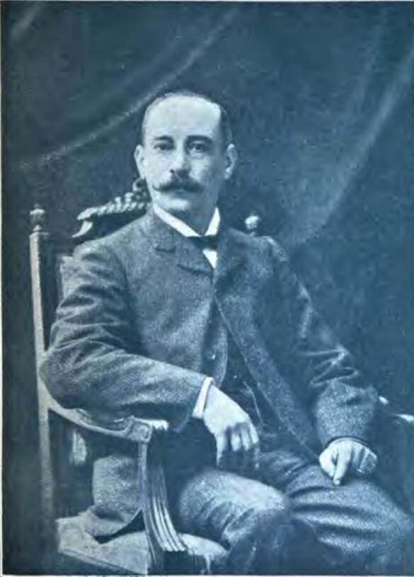 Retrato - fotografía del literato Antonio de la Cuesta y Sainz